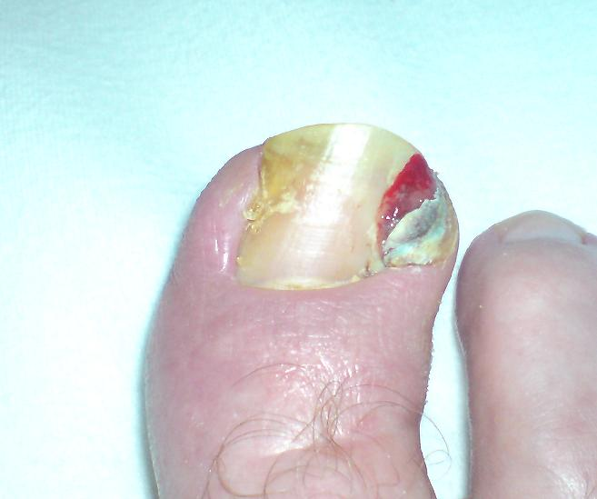 unguis incarnatus